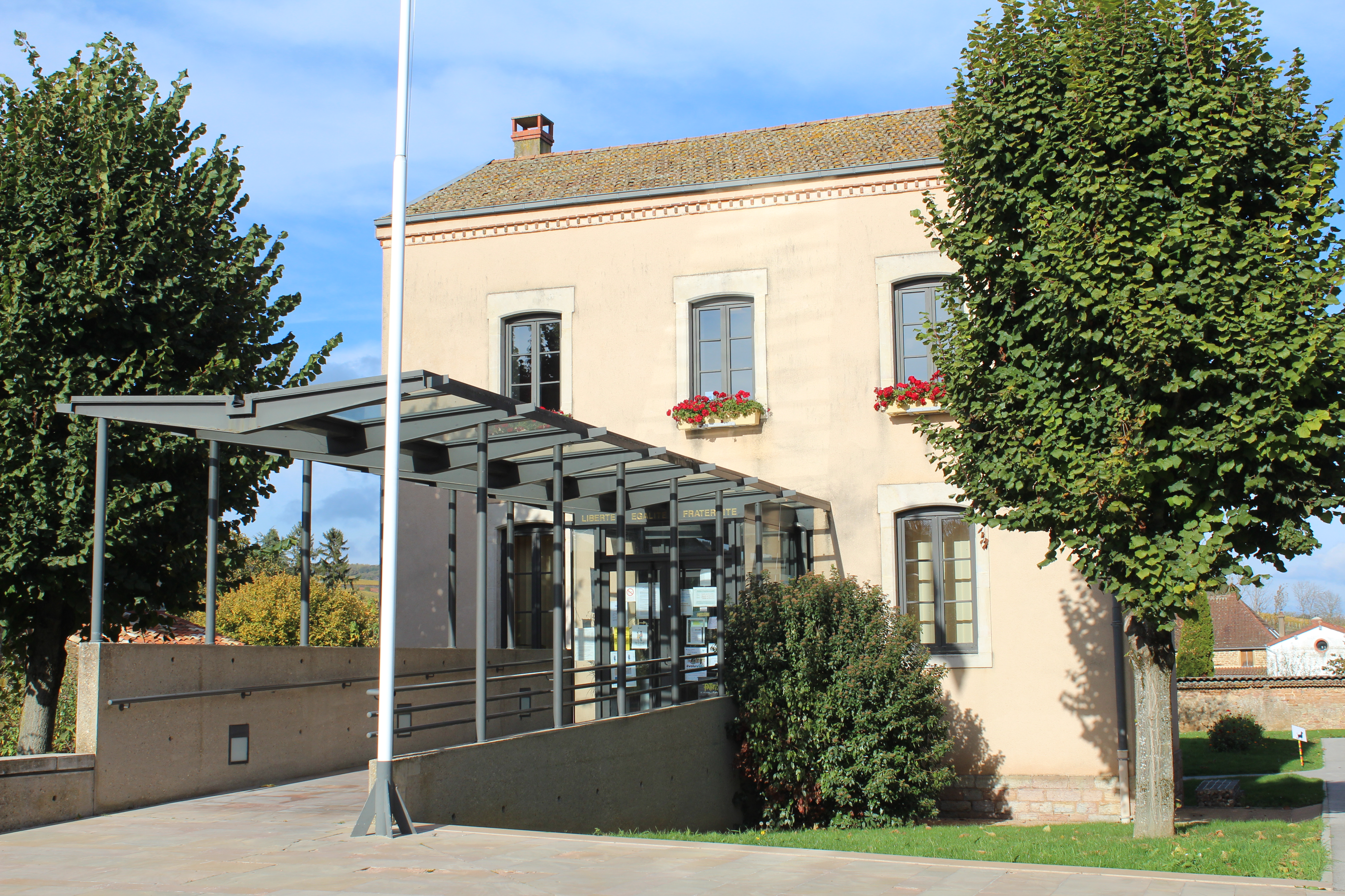 Mairie d'Igé, Saône-et-Loire.